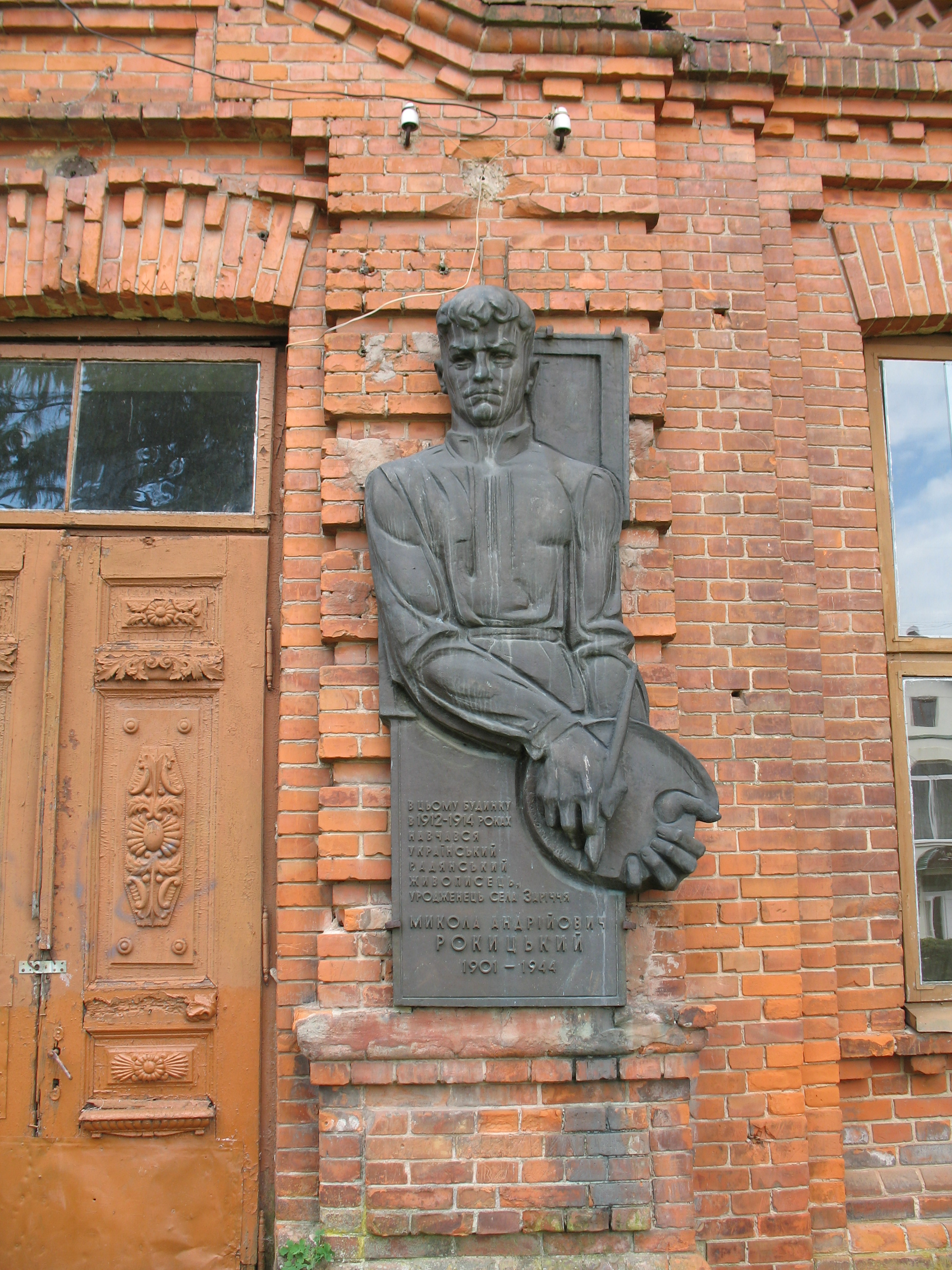 Червона школа. Напис на барельєфі: «В цьому будинку в 1912-1914 роках навчався український радянський живописець, уродженець села Заріччя Микола Андрійович Рокицький (1901—1944)»